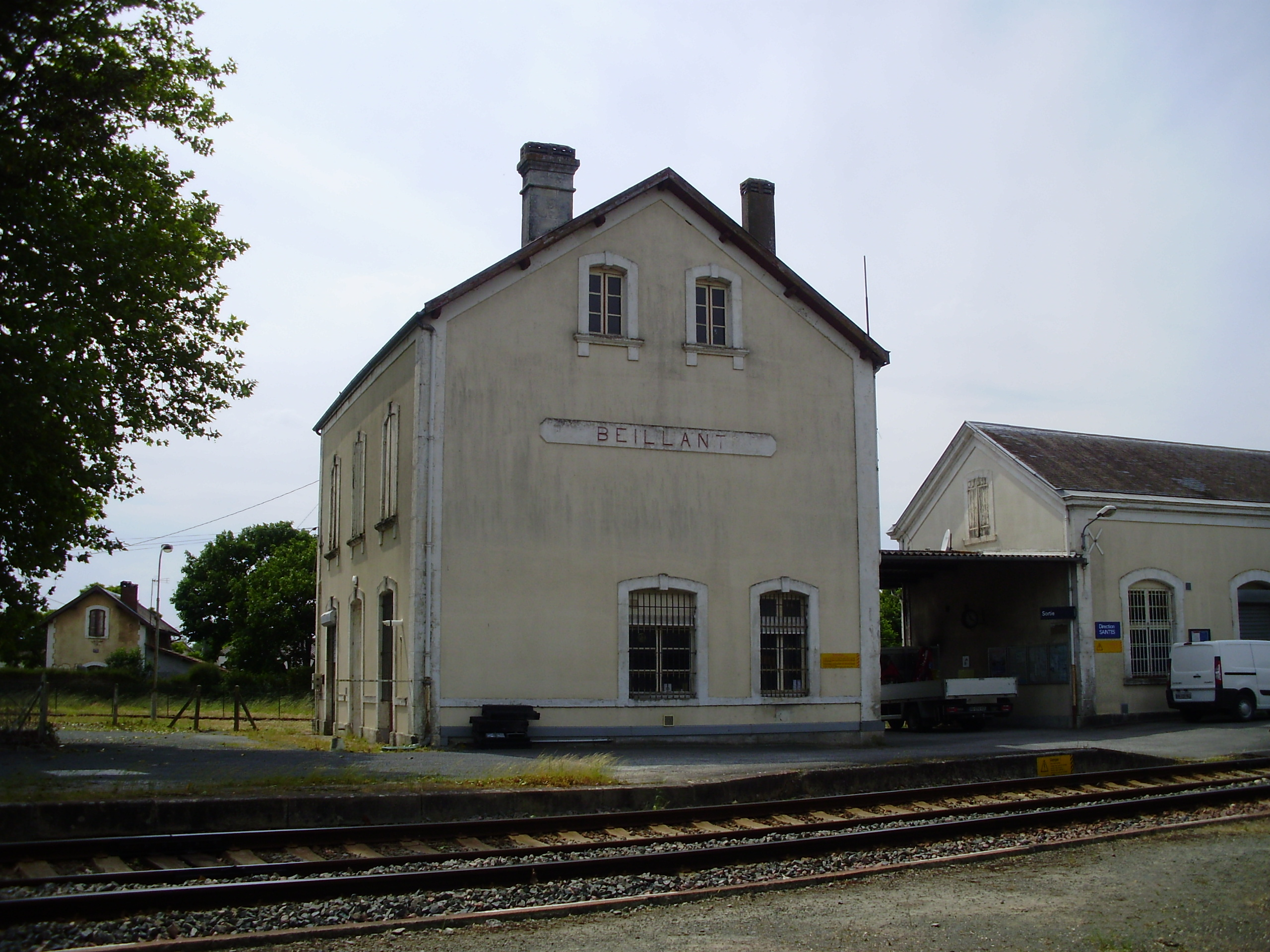 Ancien bâtiment voyageurs de la gare de Beillant, Charente-Maritime, France, vu depuis le quai vers Angoulême.